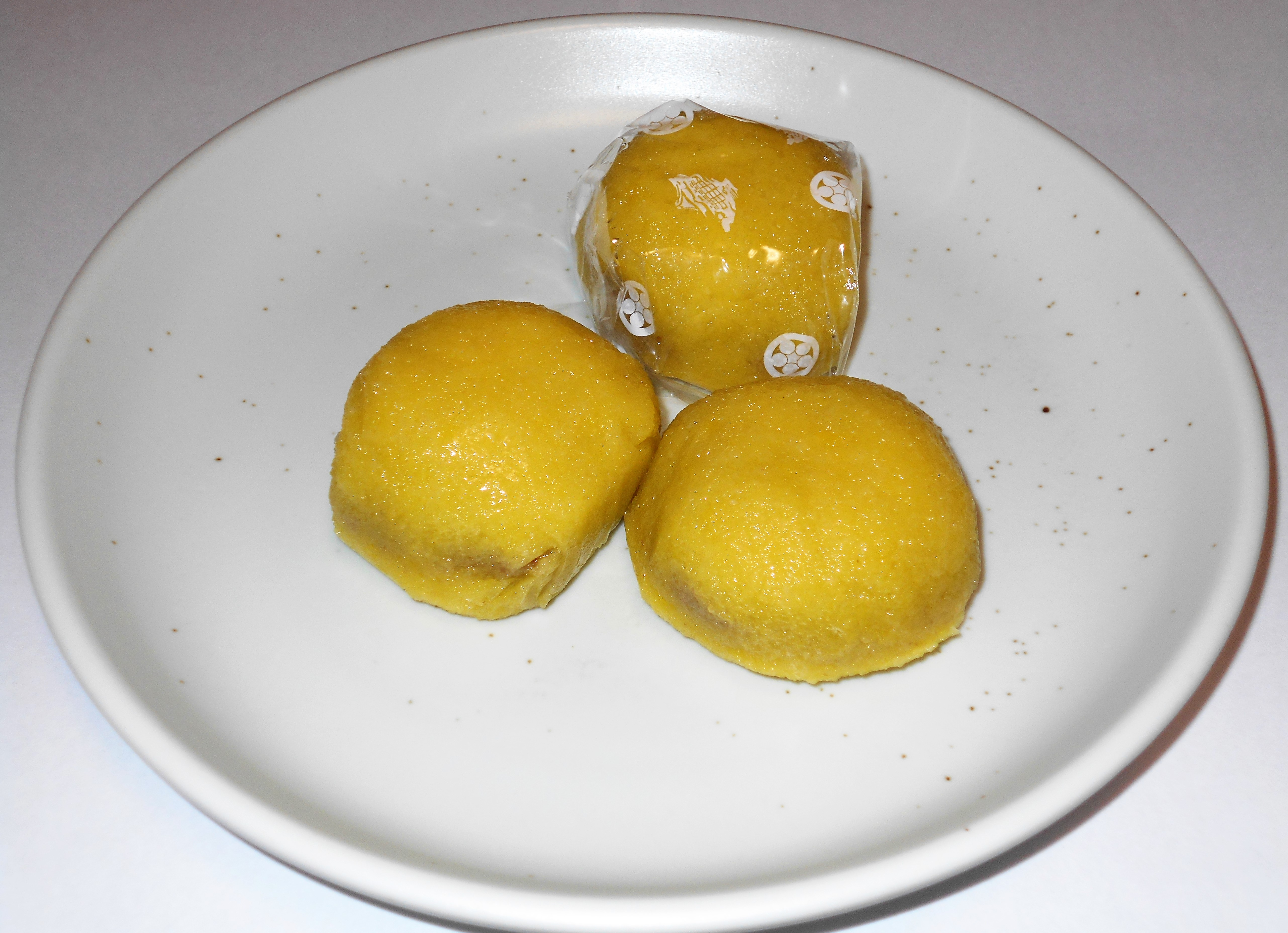 粟饅頭（小池菓子舗）